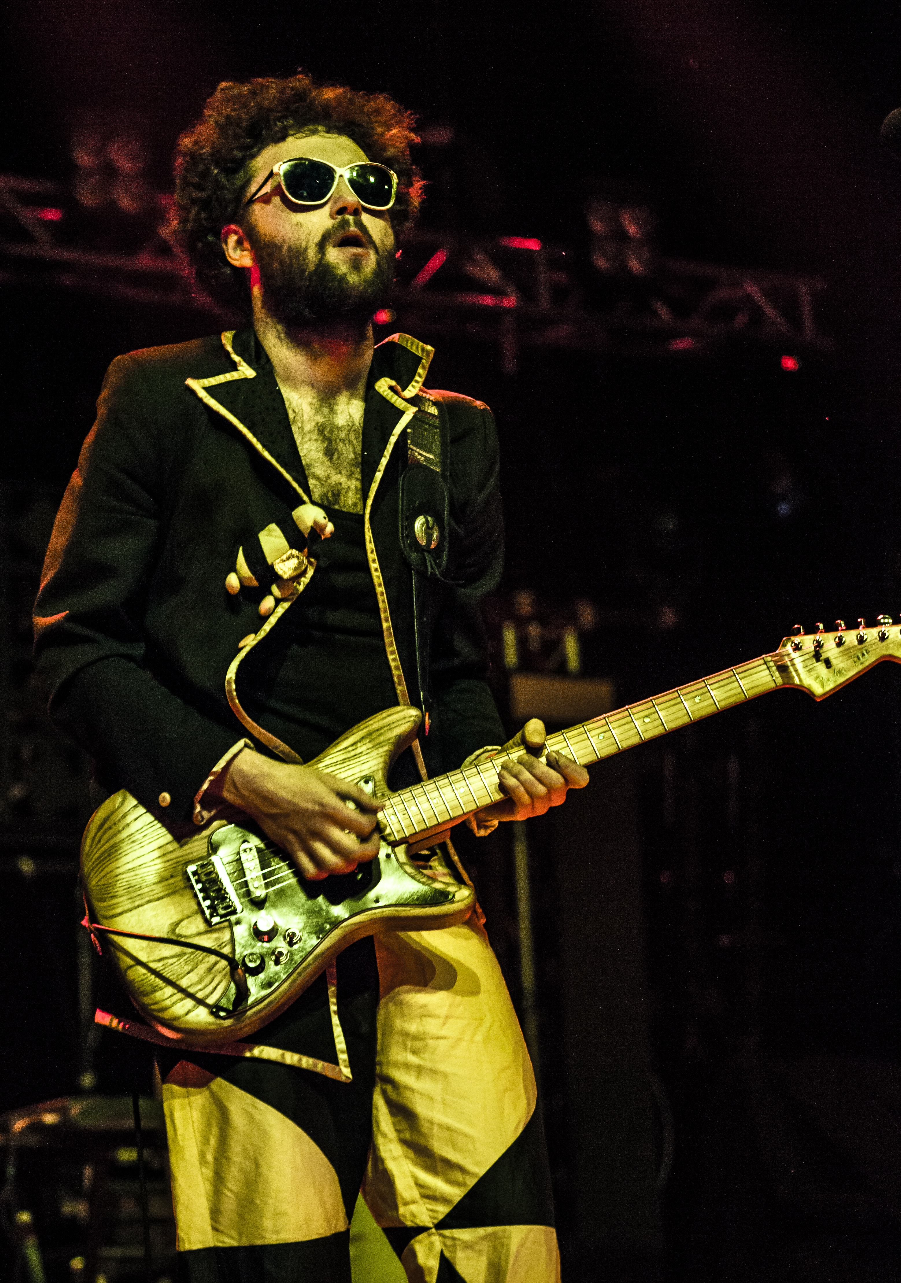 Michał Chęć "Bonk", gitarzysta zespołu Łąki Łan podczas Rocket Festiwal 2013 w Warszawie.